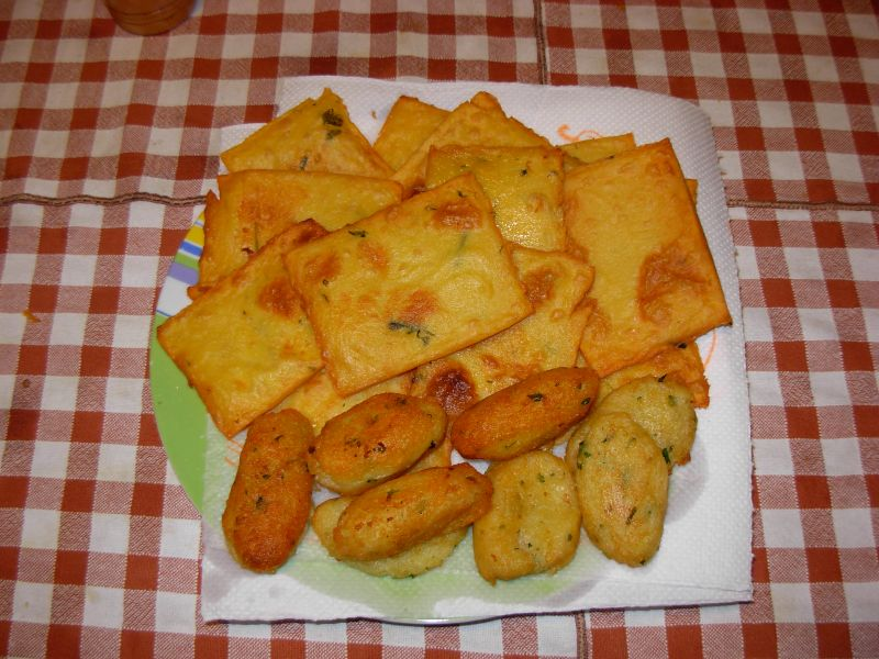 calde calde